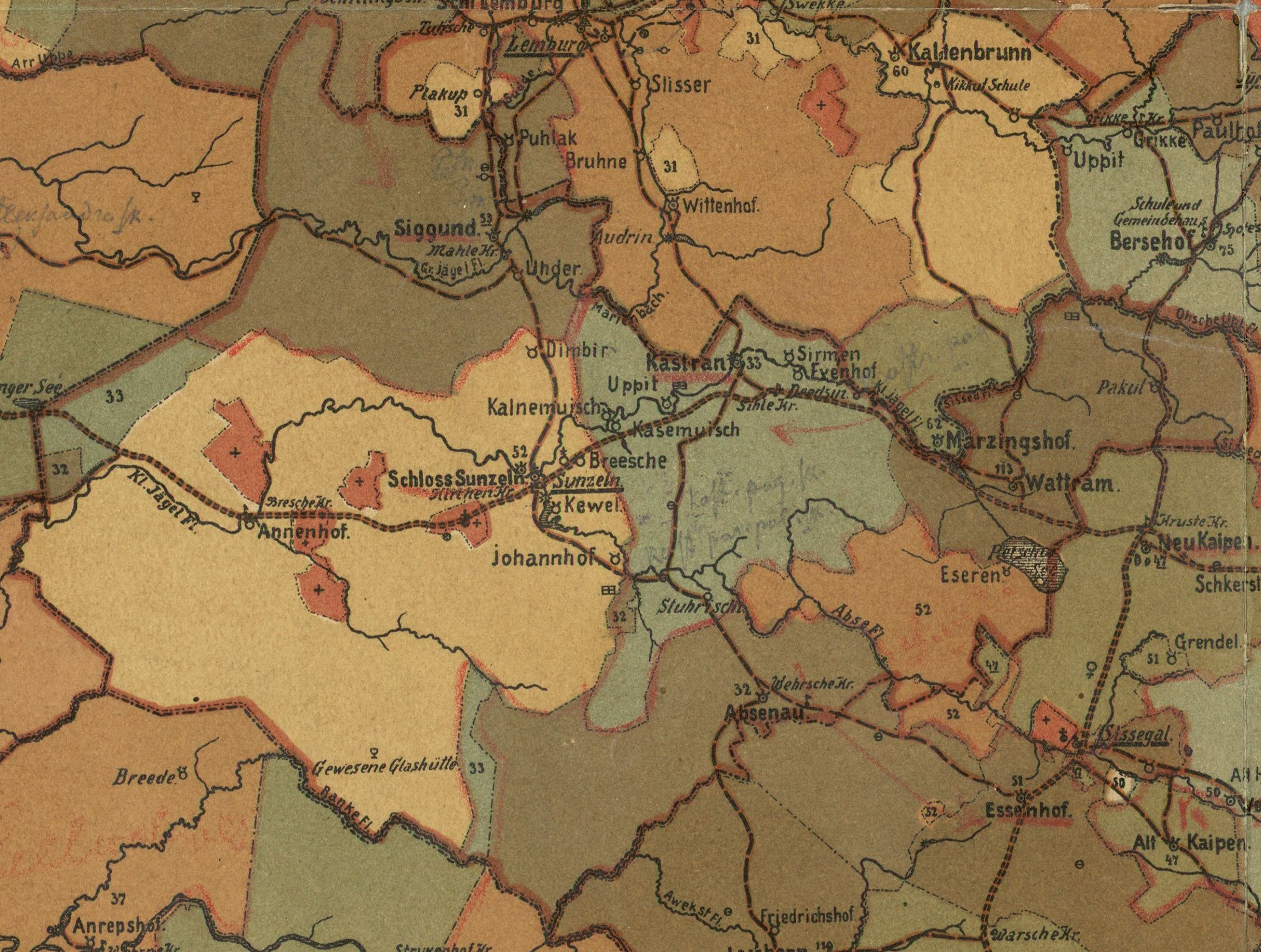 Suntaži kihelkonna mõisad 1905. aastal